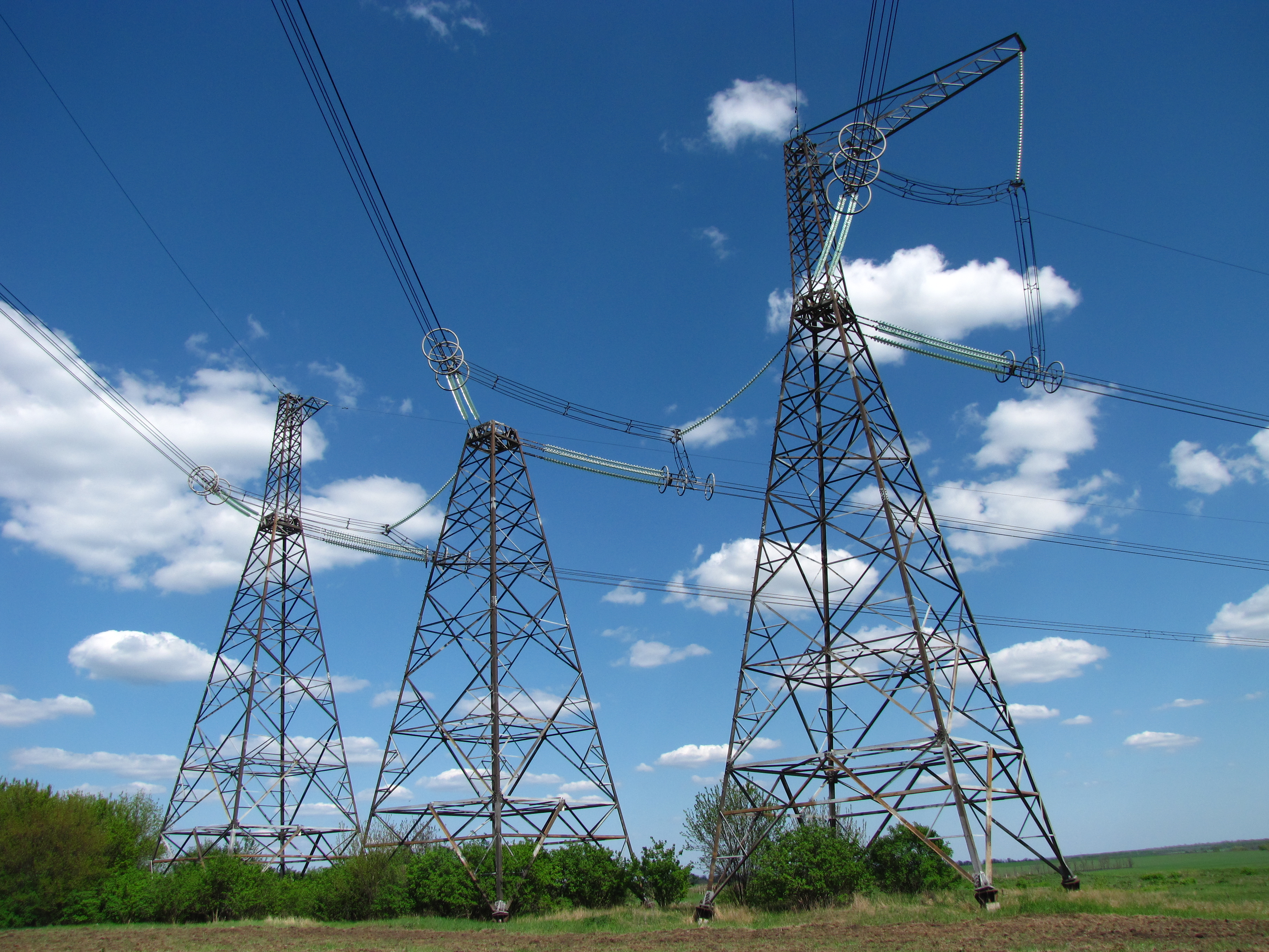 Анкерно-угловая трёхстоечная опора воздушной ЛЭП 750 кВ, постройки конца 80-х годов ХХ века, СССР.